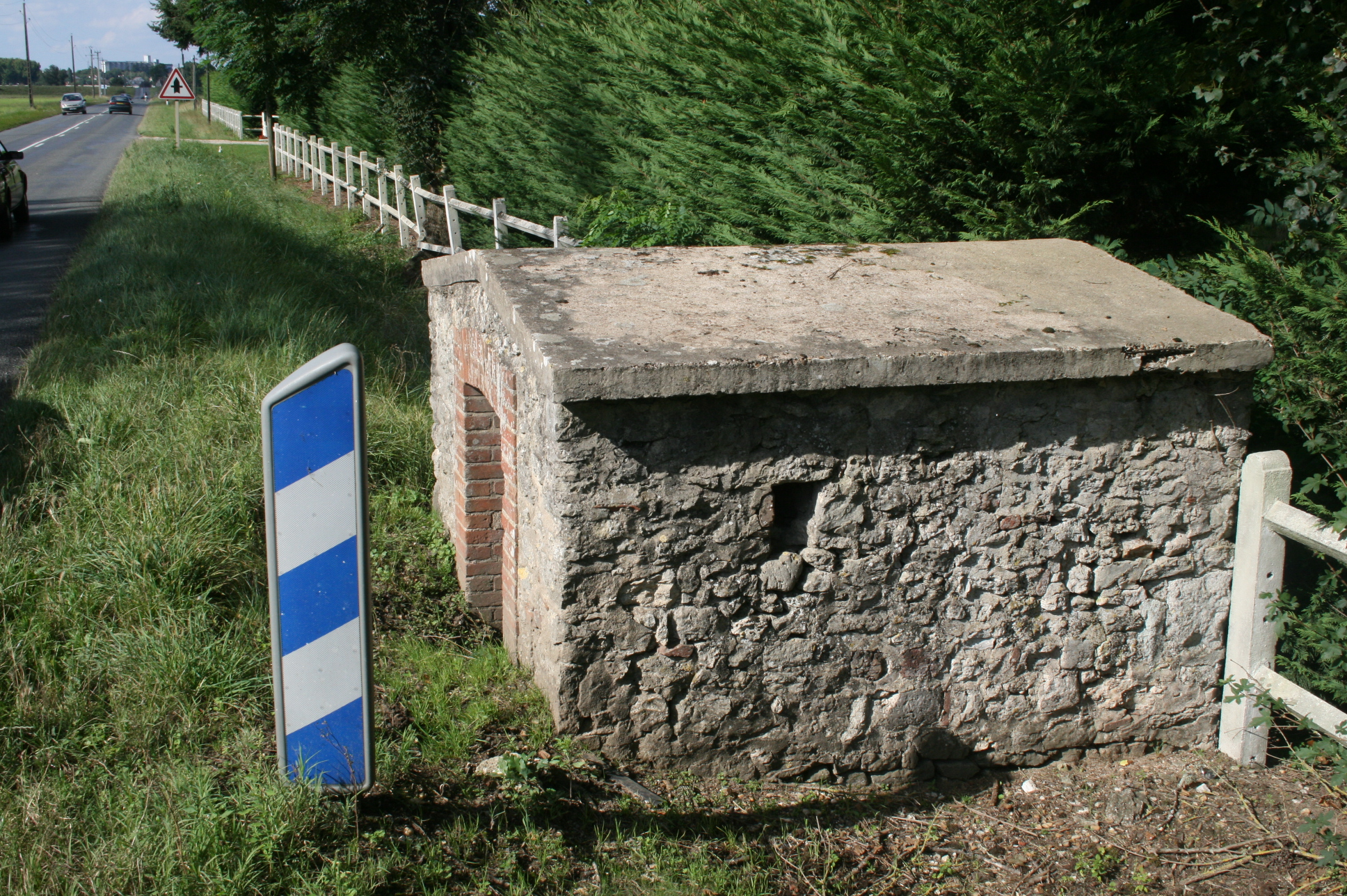 Balise J13 avertissant un obstacle (abri cantonnier) - France